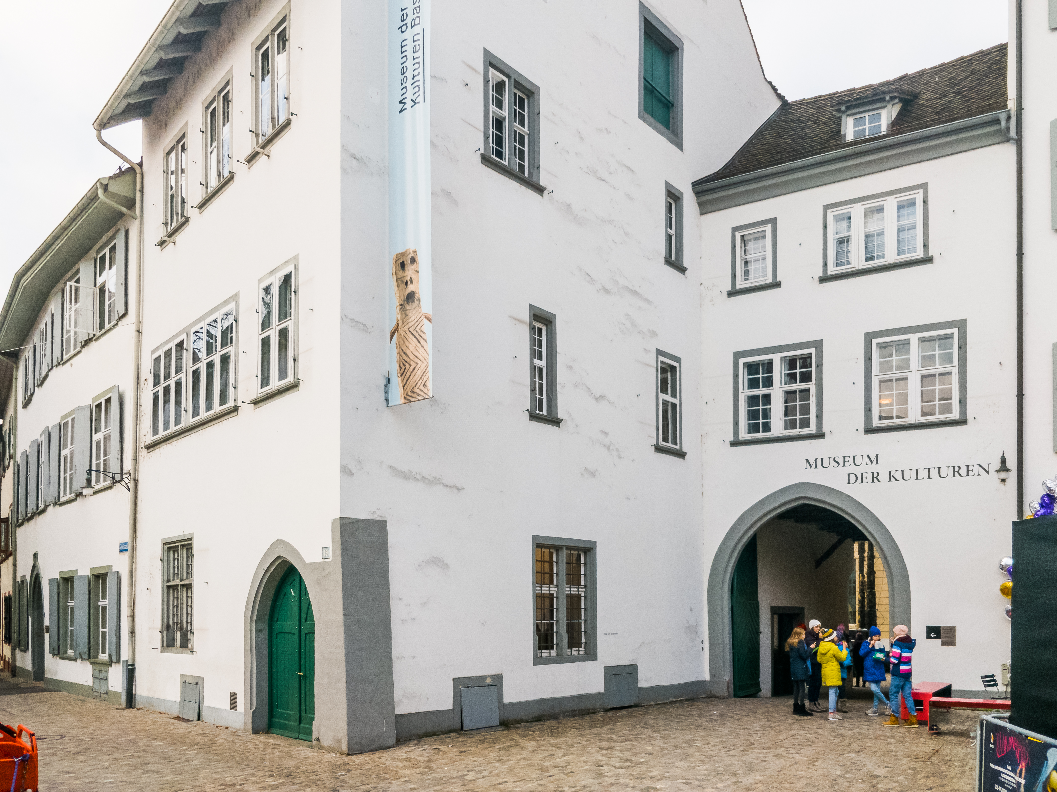 Museum der Kulturen Basel, Münsterplatz